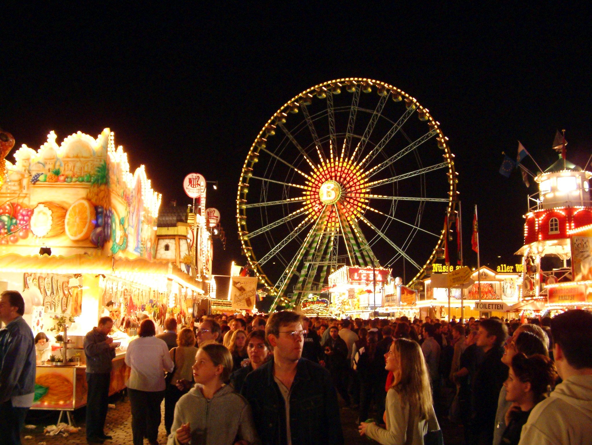 Düsseldorf - größte Kirmes am Rhein.